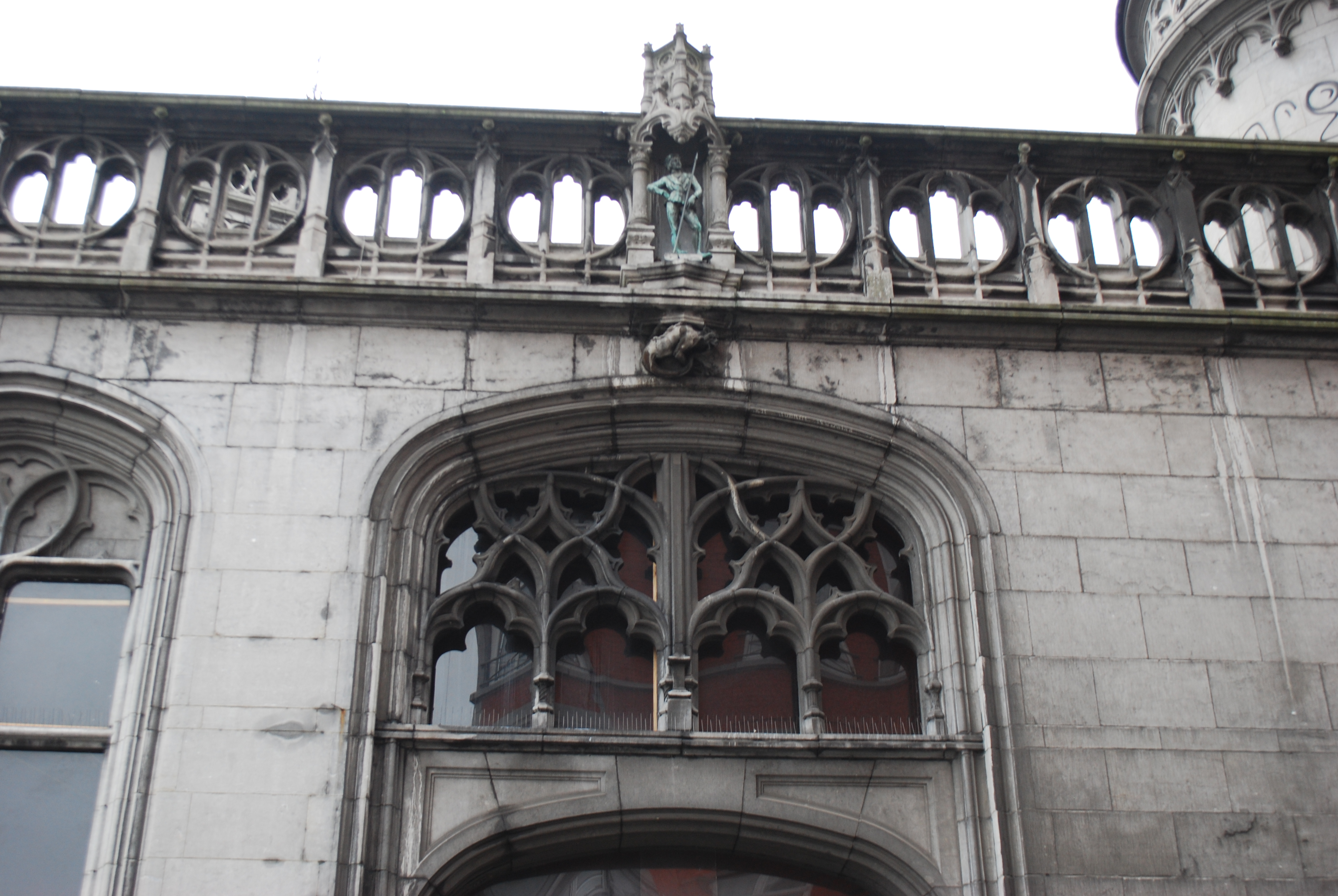 Vue du quartier de "Cathédrale-Nord", dans le centre de Liège (Belgique).